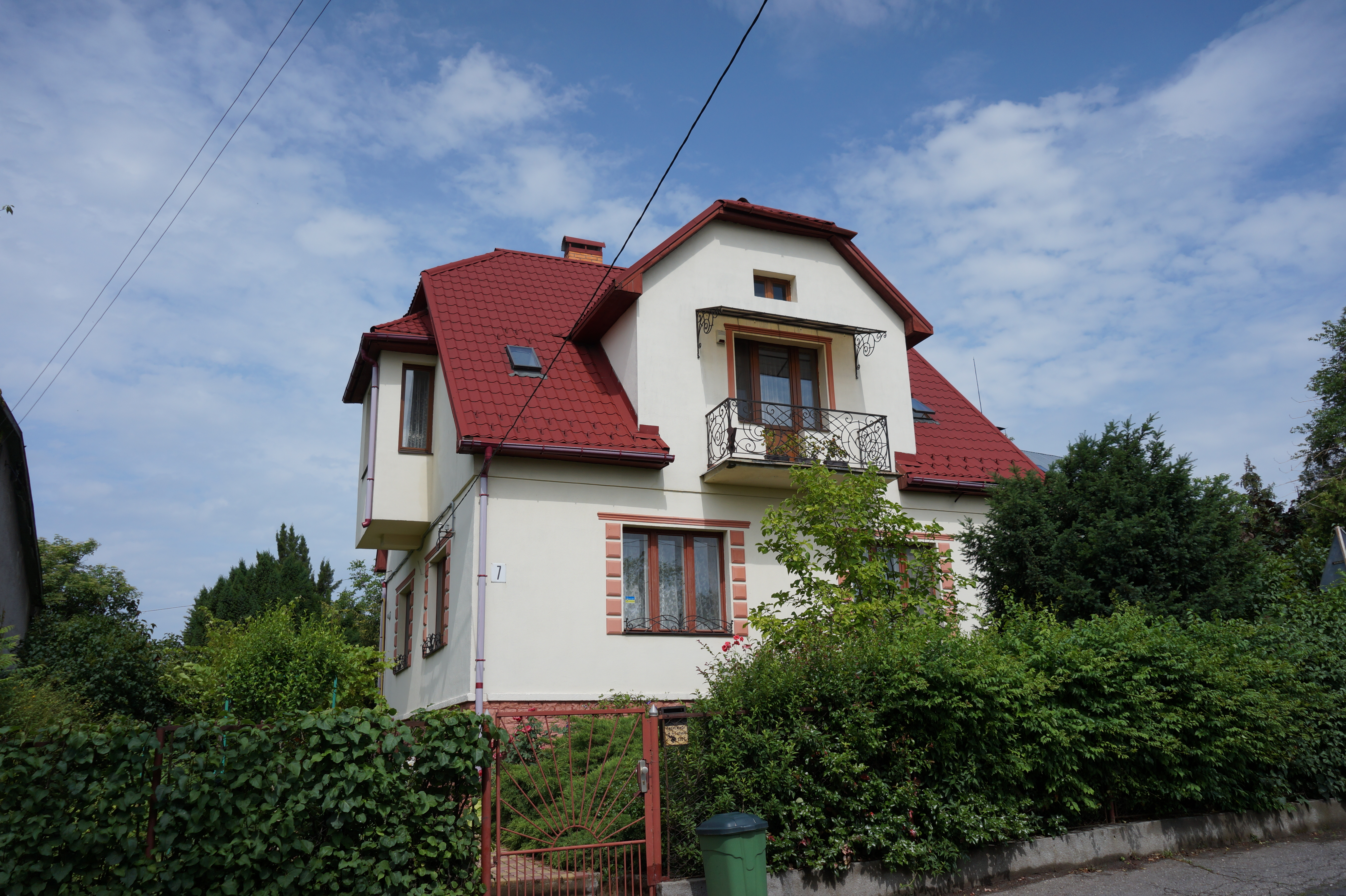 Будинок, в якому жив і працював Закарпатський російський письменник М.Г. Тевельов, Ужгород, вул. Висока, 7